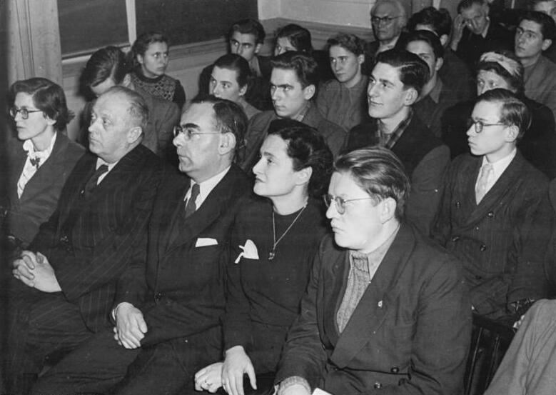 Zentralbild Quasch. 2.2.52 Marie Majerowa 70 Jahre. Zu Ehren des 70. Geburtstags der tschechoslowakischen Dichterin Marie Majerowa fand am 1.2.52 im Haus des Kulturbundes in Berlin eine Feierstunde statt. UBz: V. rechts nach links: Nationalpreisträger Kuba, Botschaftsrat Fürnberg und Frau, Karl Knetschke.